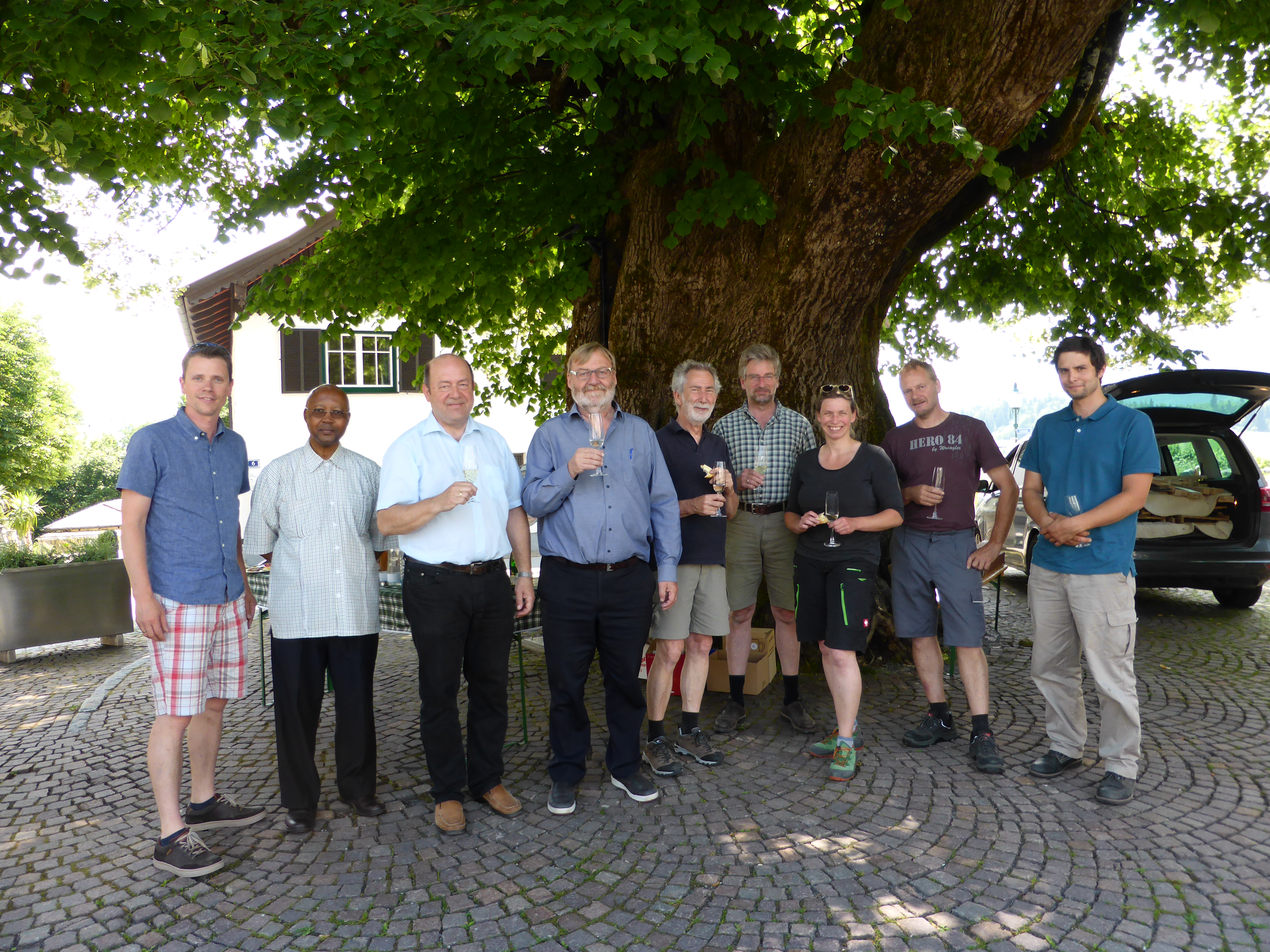 Eintreffen Linder-Orgel, Festakt mit Pater Clement